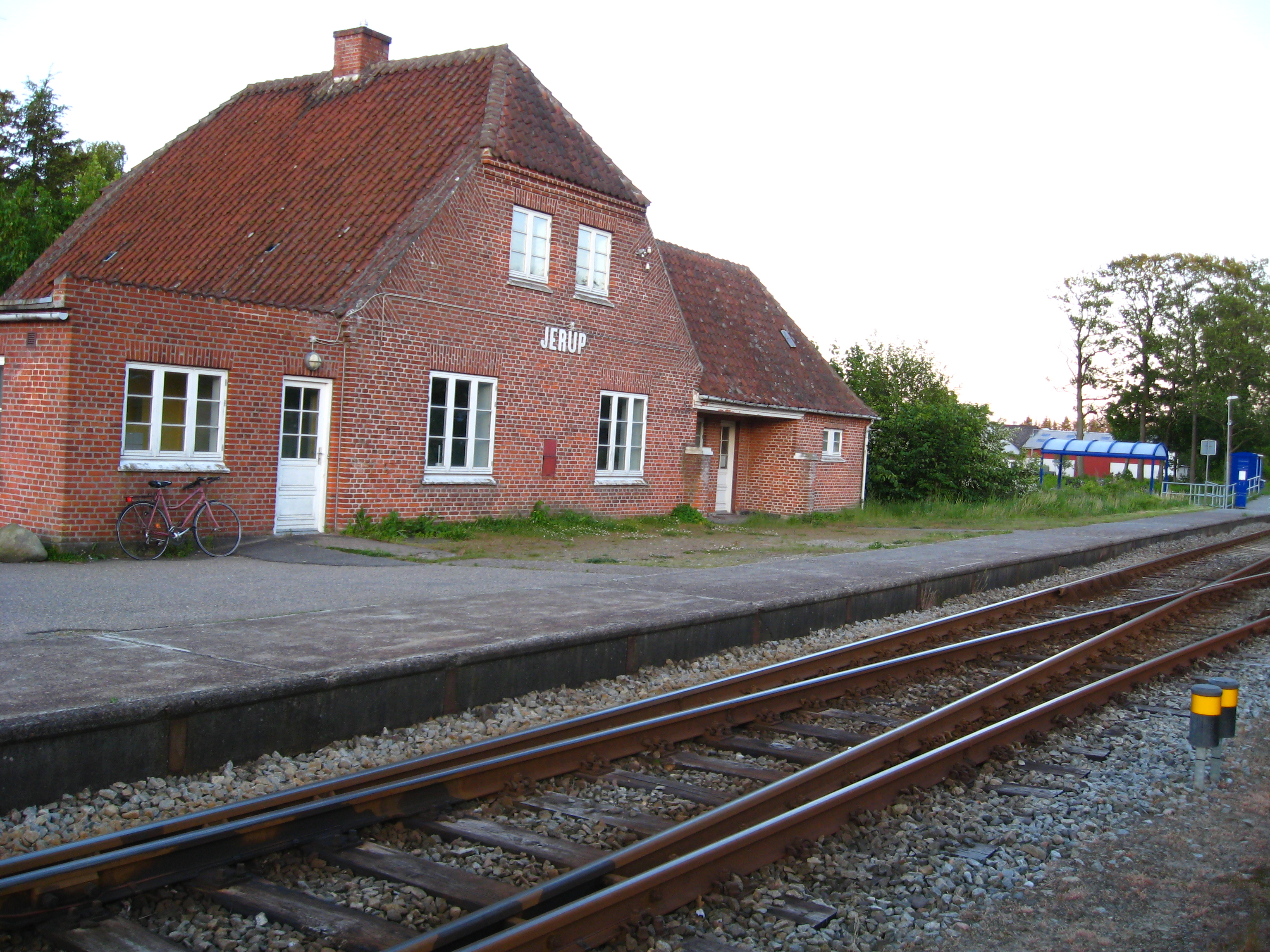 Jerup Station, F-havn kommune